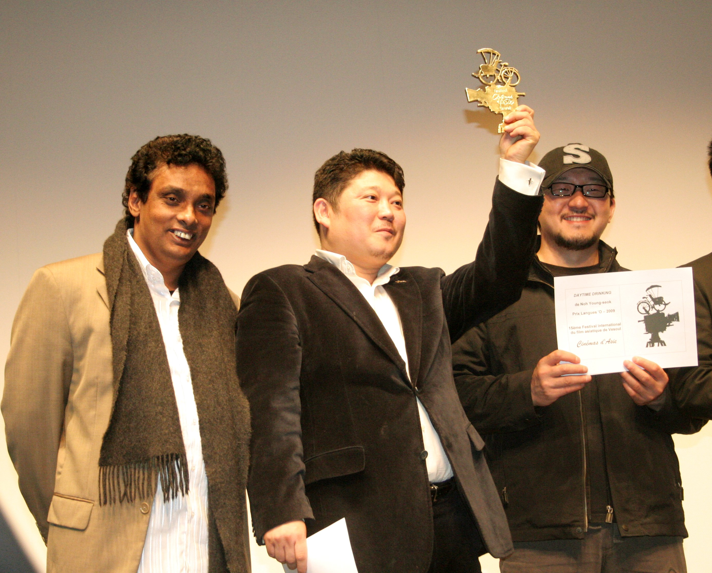 Cyclo d'or 2009, Festival international des cinémas d'Asie de Vesoul